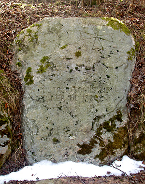 Monument hvor Tvenstrup Kirke stod indtil 1820